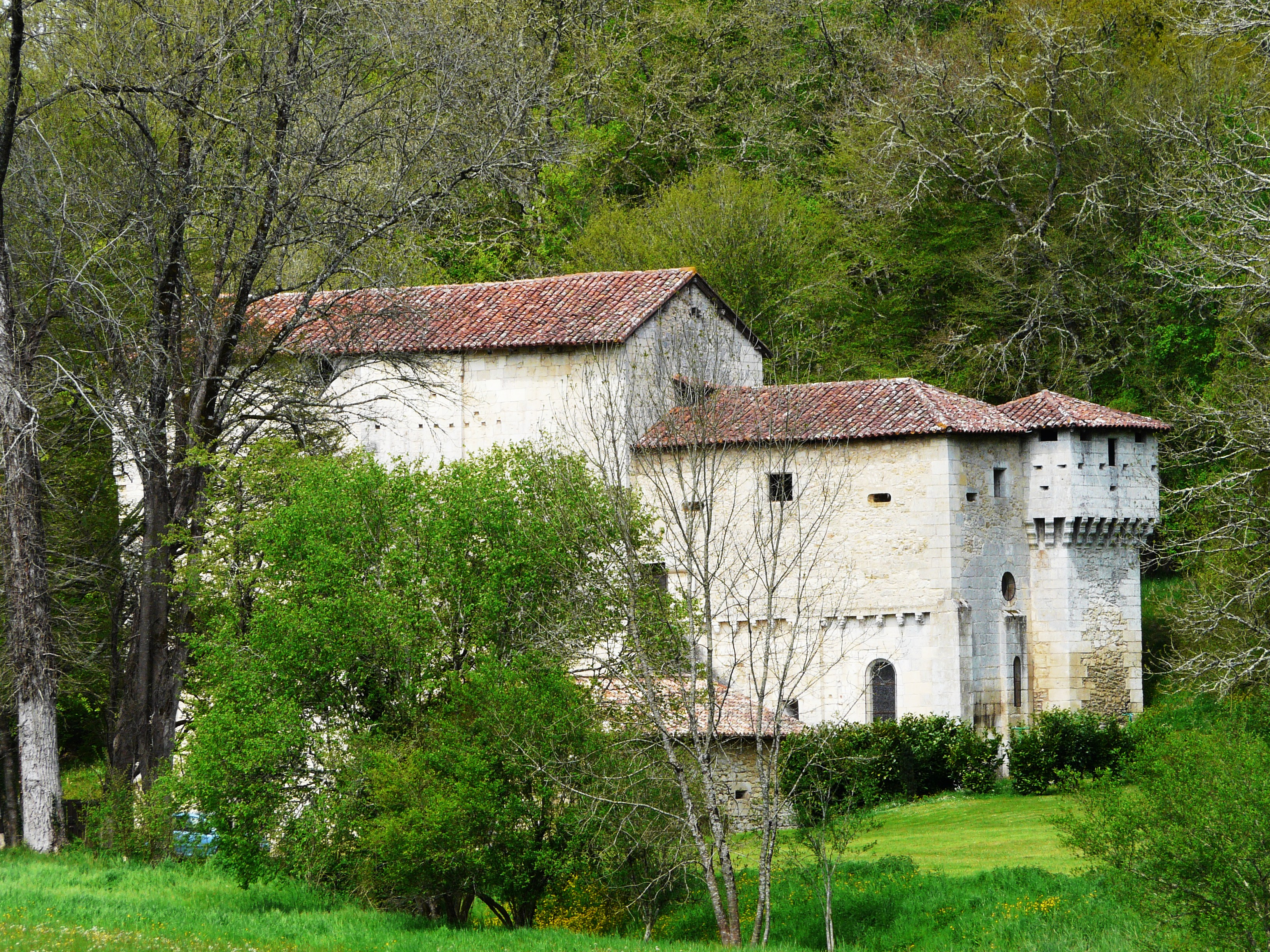 Prieuré de Merlande Object location45° 14′ 25″ N, 0° 38′ 07″ E